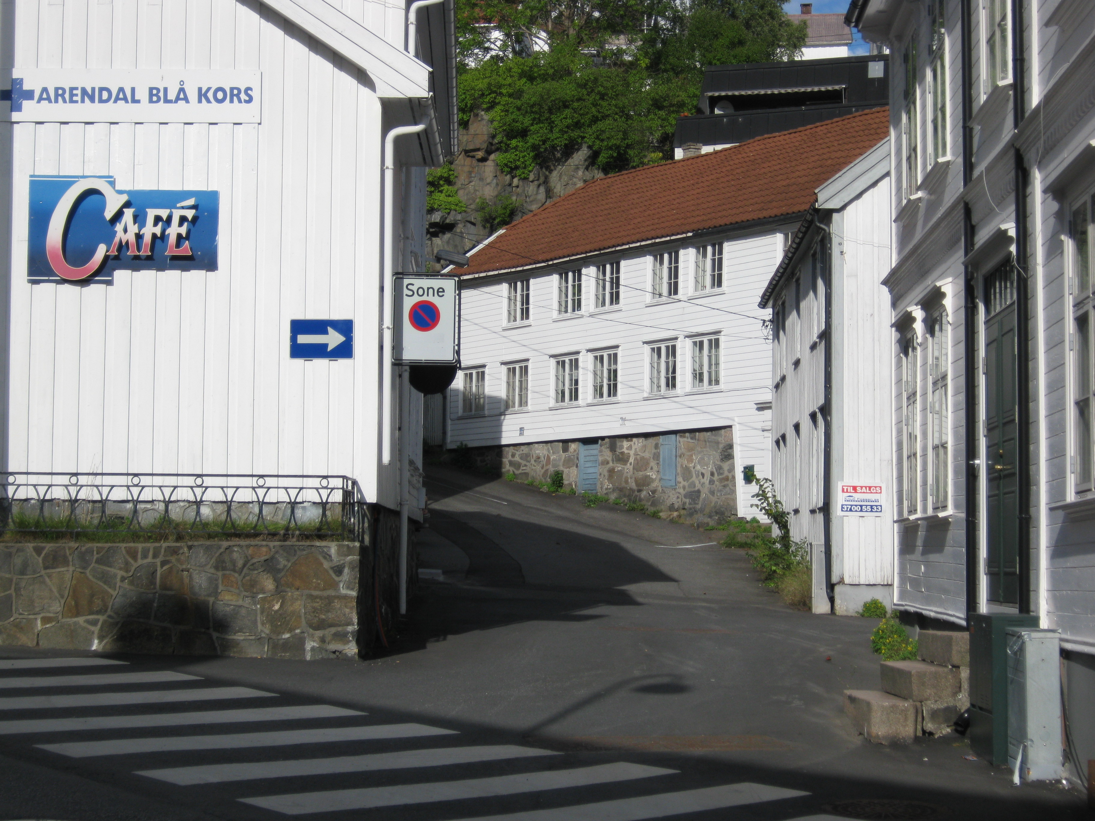 Grensen i Arendal